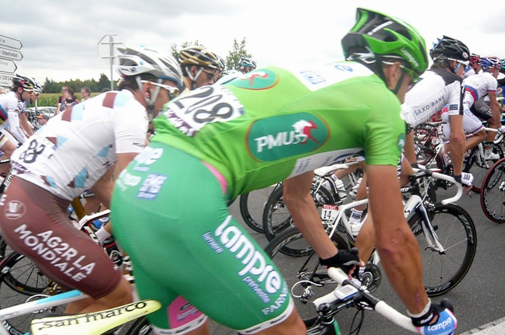 Alessandro Petacchi avec le maillot vert sur le Tour 2010